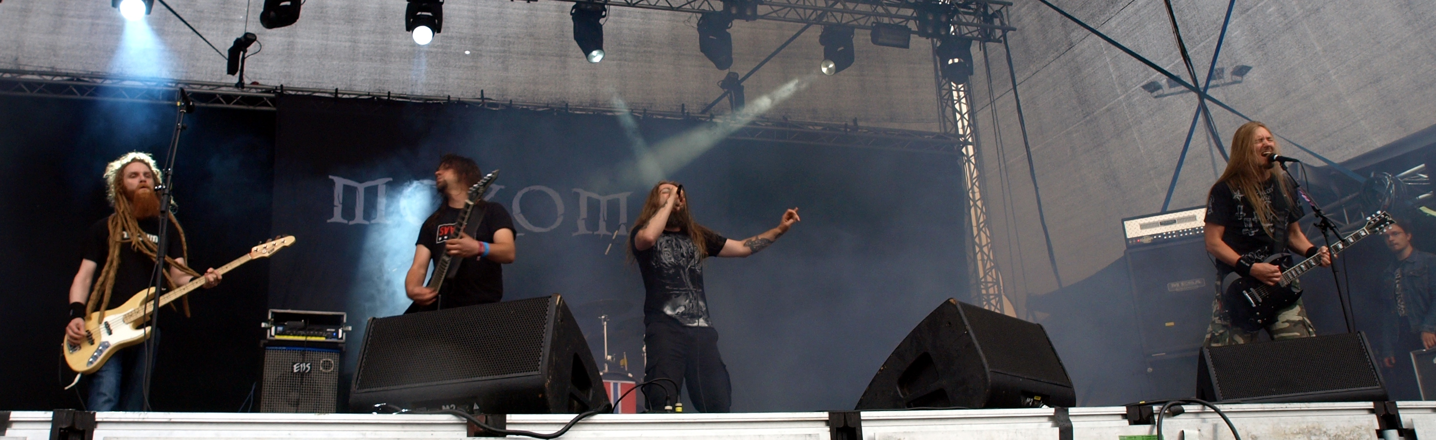 Mokoma live am Myötätuulirock 2011